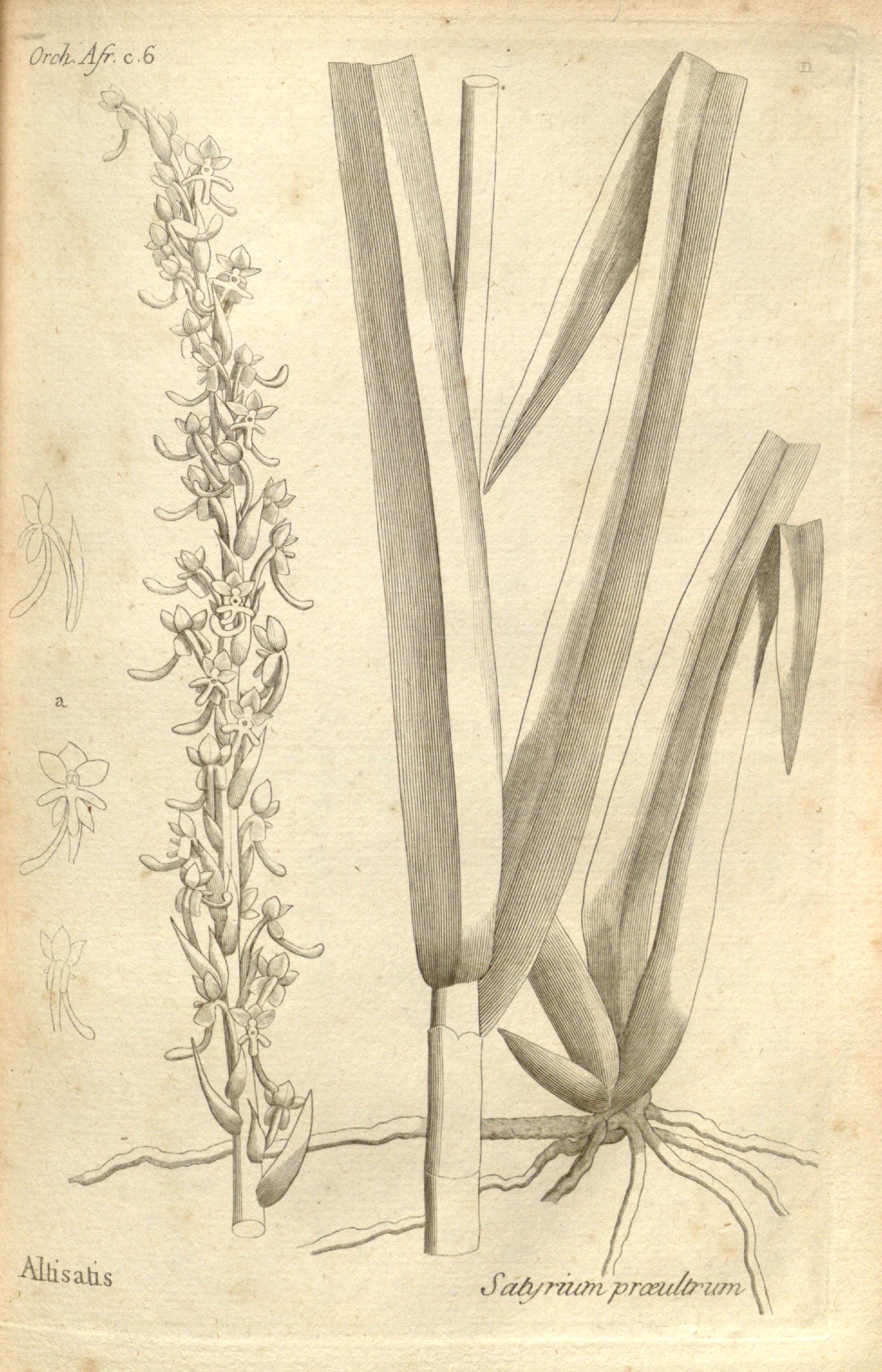 Histoire particulière des plantes Orchidées recueillies sur les trois îles australes d'Afrique, de France, de Bourbon et de Madagascar /par Aubert-Aubert Du Petit-Thouars ...